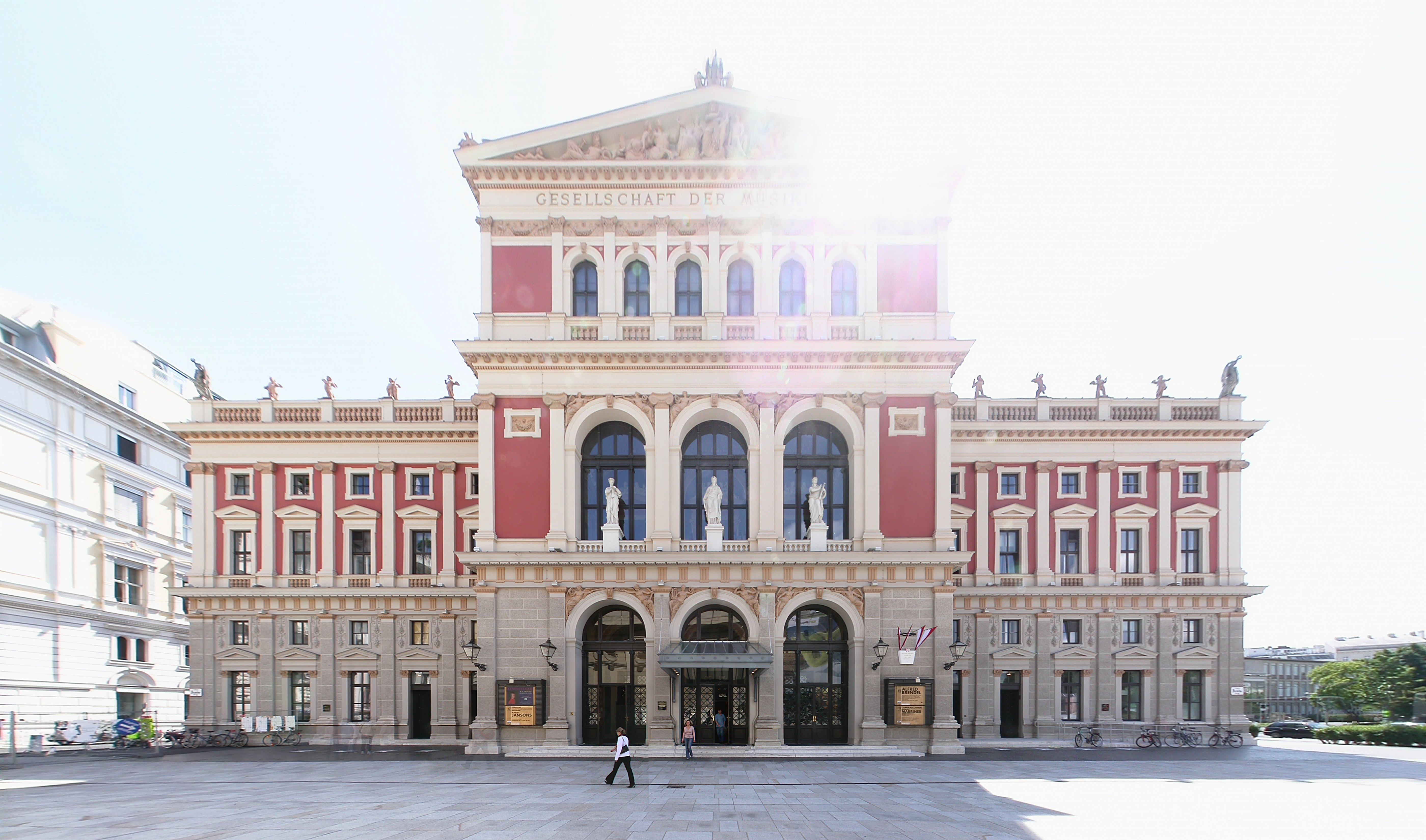 Haupteingang des Musikverein in Wien, Sommer, Tag, Blick Richtung Osten ins Gegenlicht